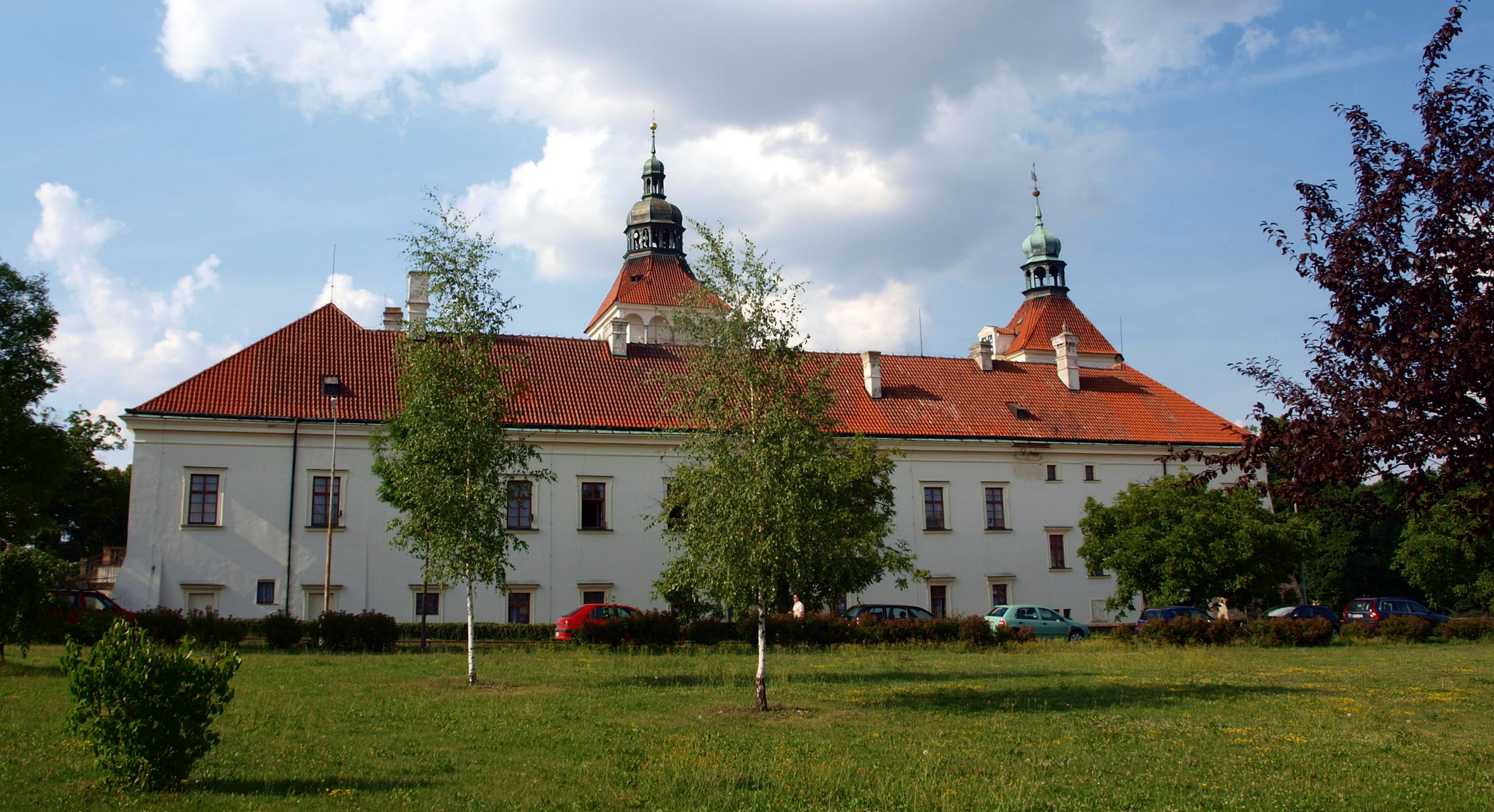 Zámek Smečno